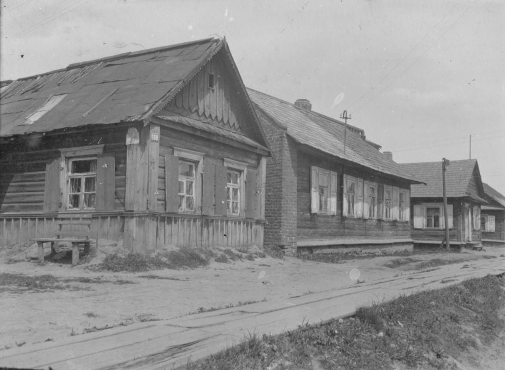 Беларуская (тарашкевіца): Менск (Miensk), Грушаўка (Hrušaŭka)